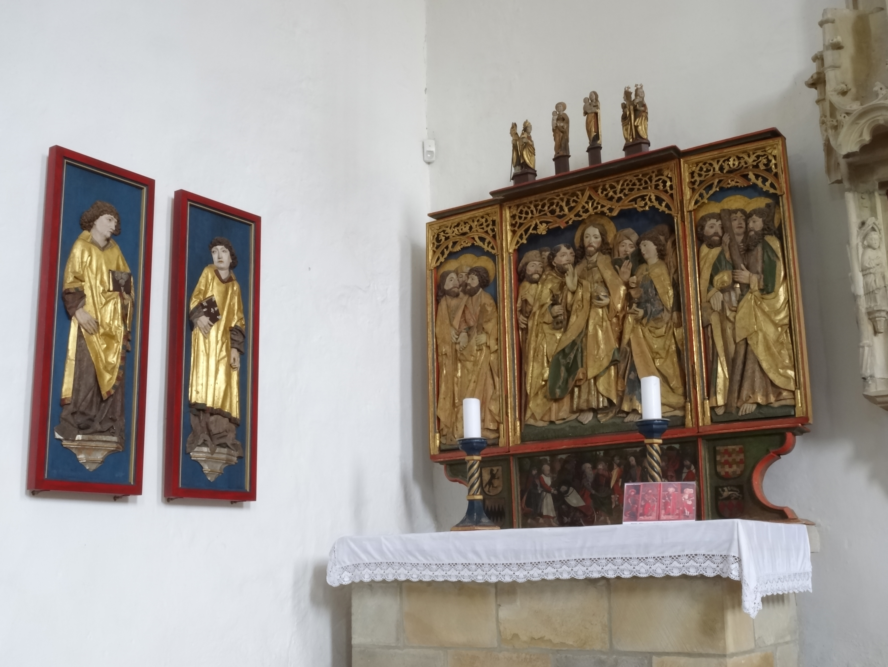 St. Leo (Bibra), Apostelaltar aus der Riemenschneider-Werkstatt